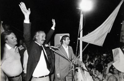 Osvaldo Álvarez Guerrero, gobernador de Río Negro (1983-1987), celebra su victoria la noche de las elecciones provinciales de 1983 como candidato de la Unión Cívica Radical, imponiéndose ante el ex gobernador justicialista Mario Franco.